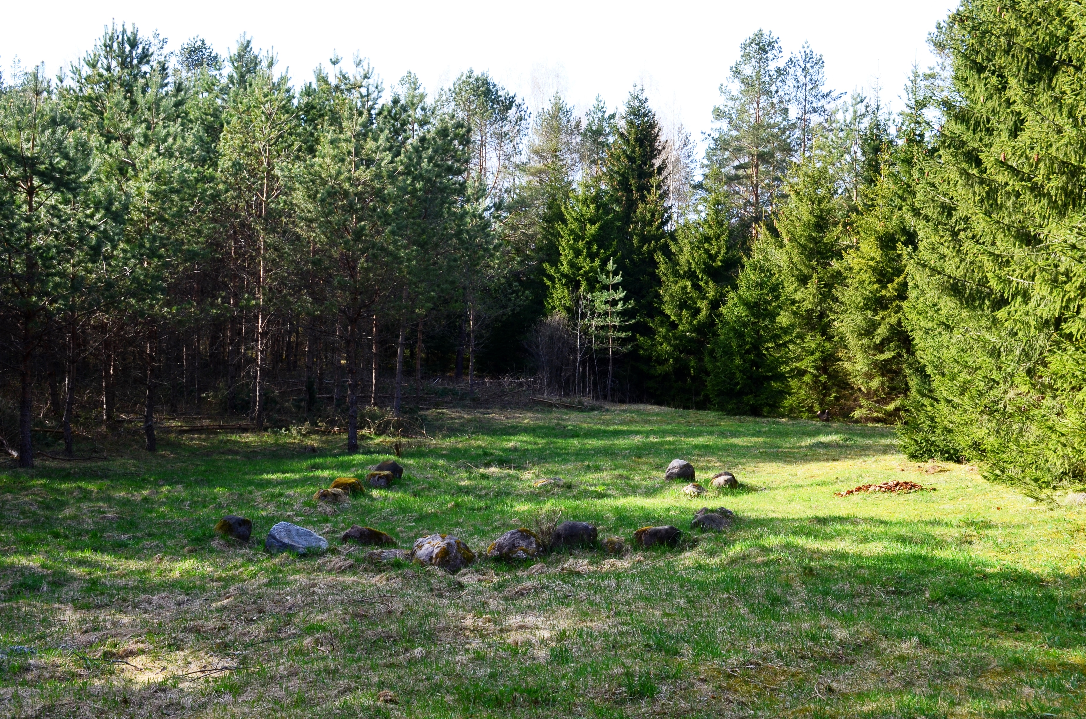 Pamatai (?), Žvyriškės, Vilniaus rajonas